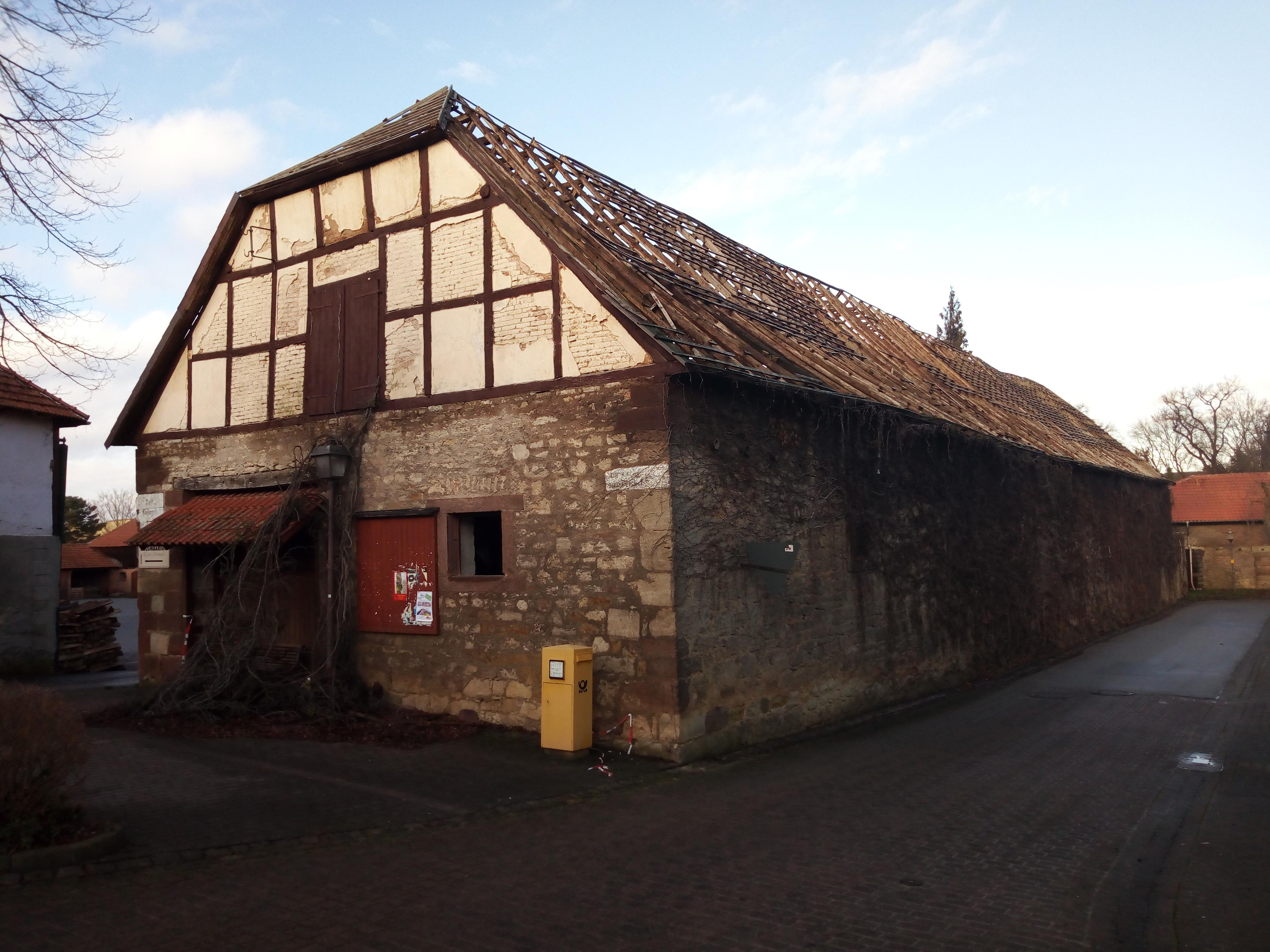 Klostergut Wormeln, Schafstall